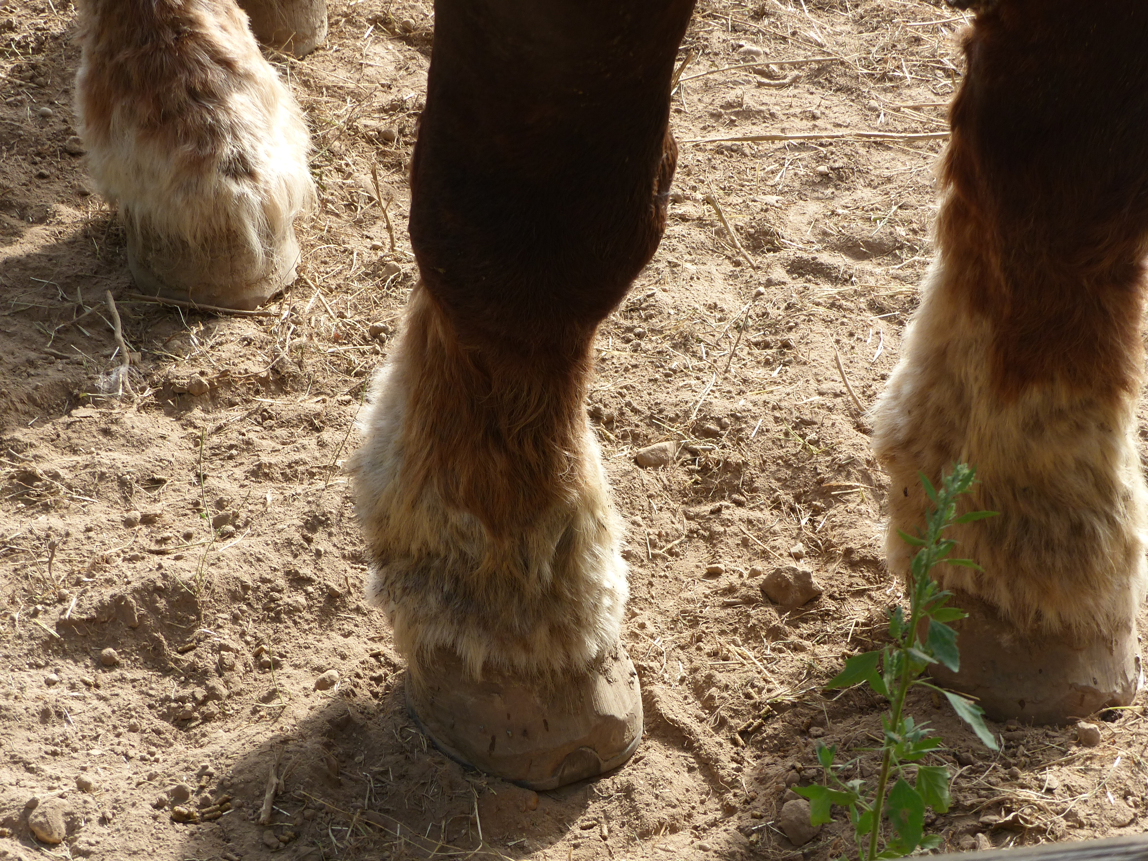 Pied d'un cheval de trait